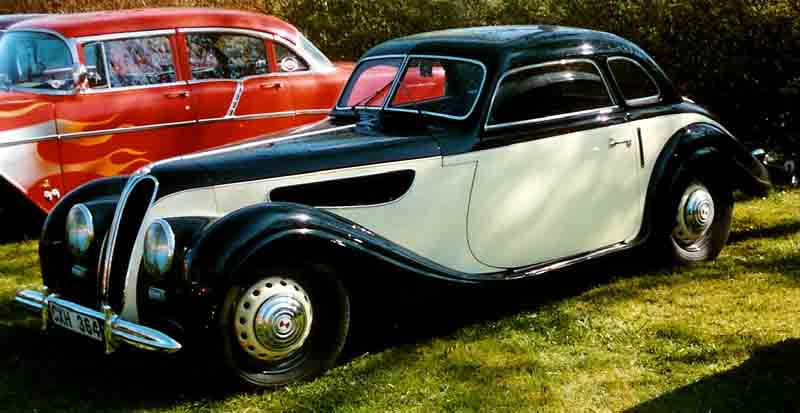 EMW 327-2 Coupé 1952